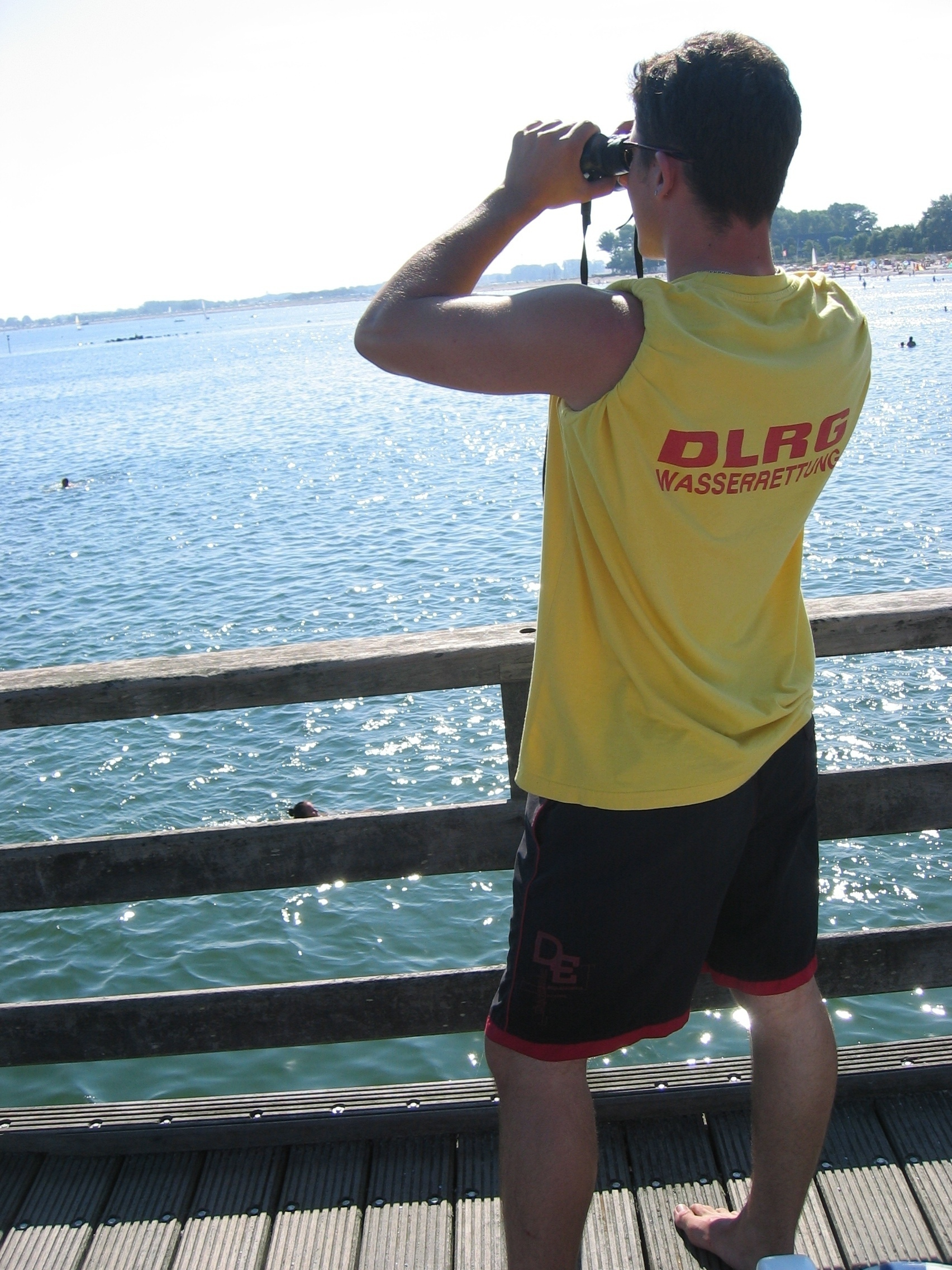 deutscher Rettungsschwimmer der DLRG bei der Arbeit